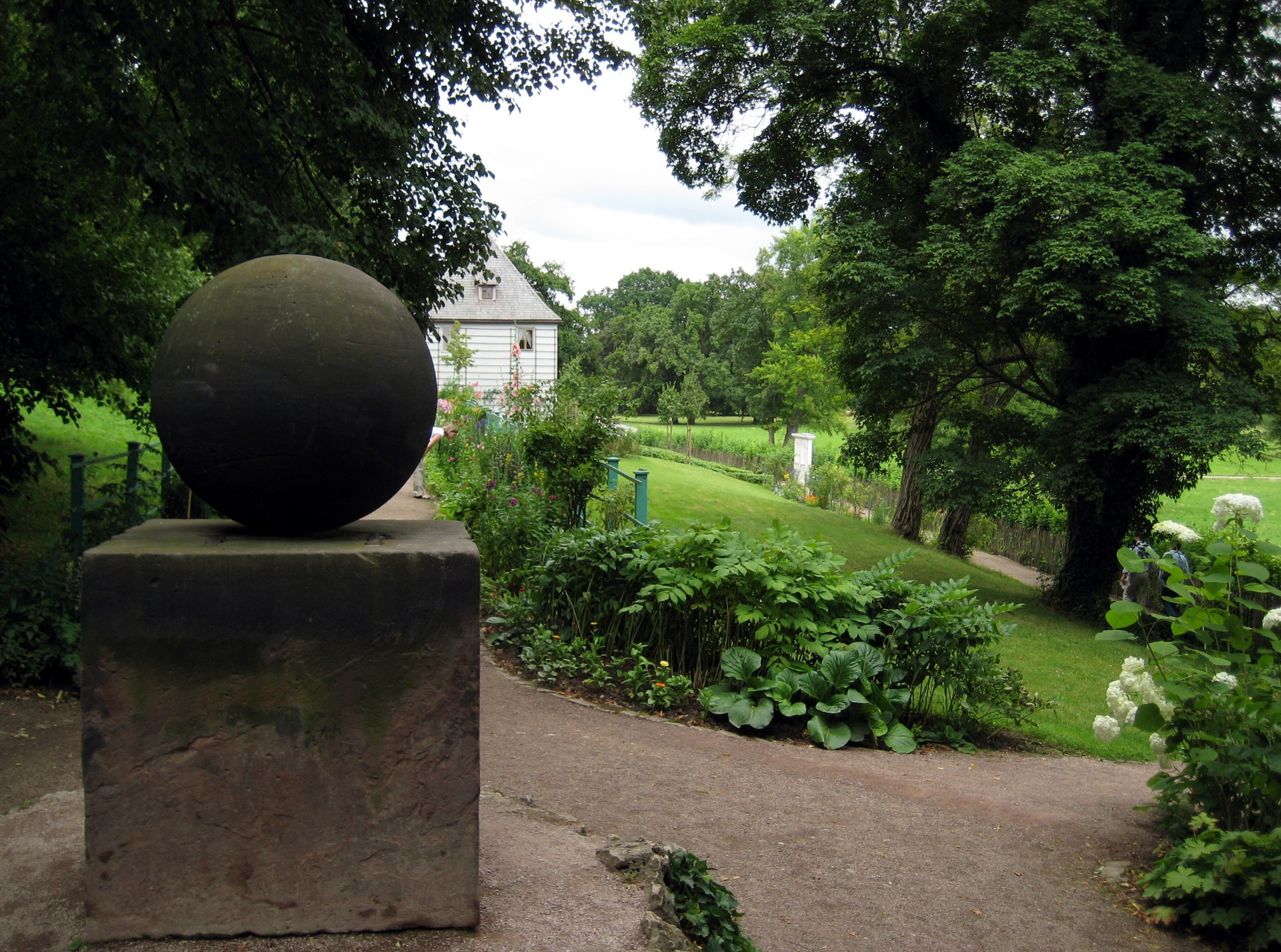 "Stein des guten Glücks" (1777) von Adam Friedrich Oeser, Goethes Gartenhaus in Weimar